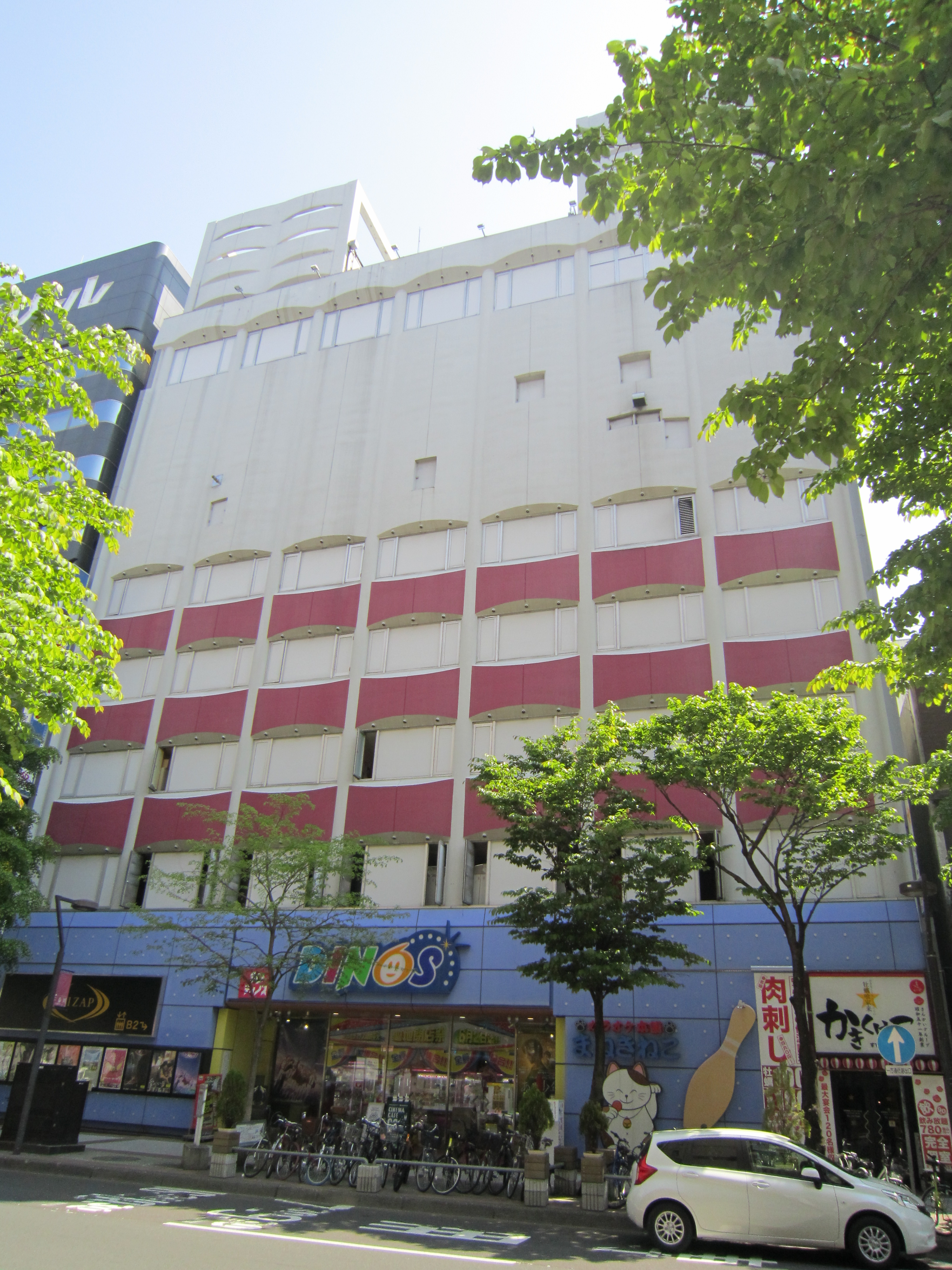 ディノス札幌中央ビル